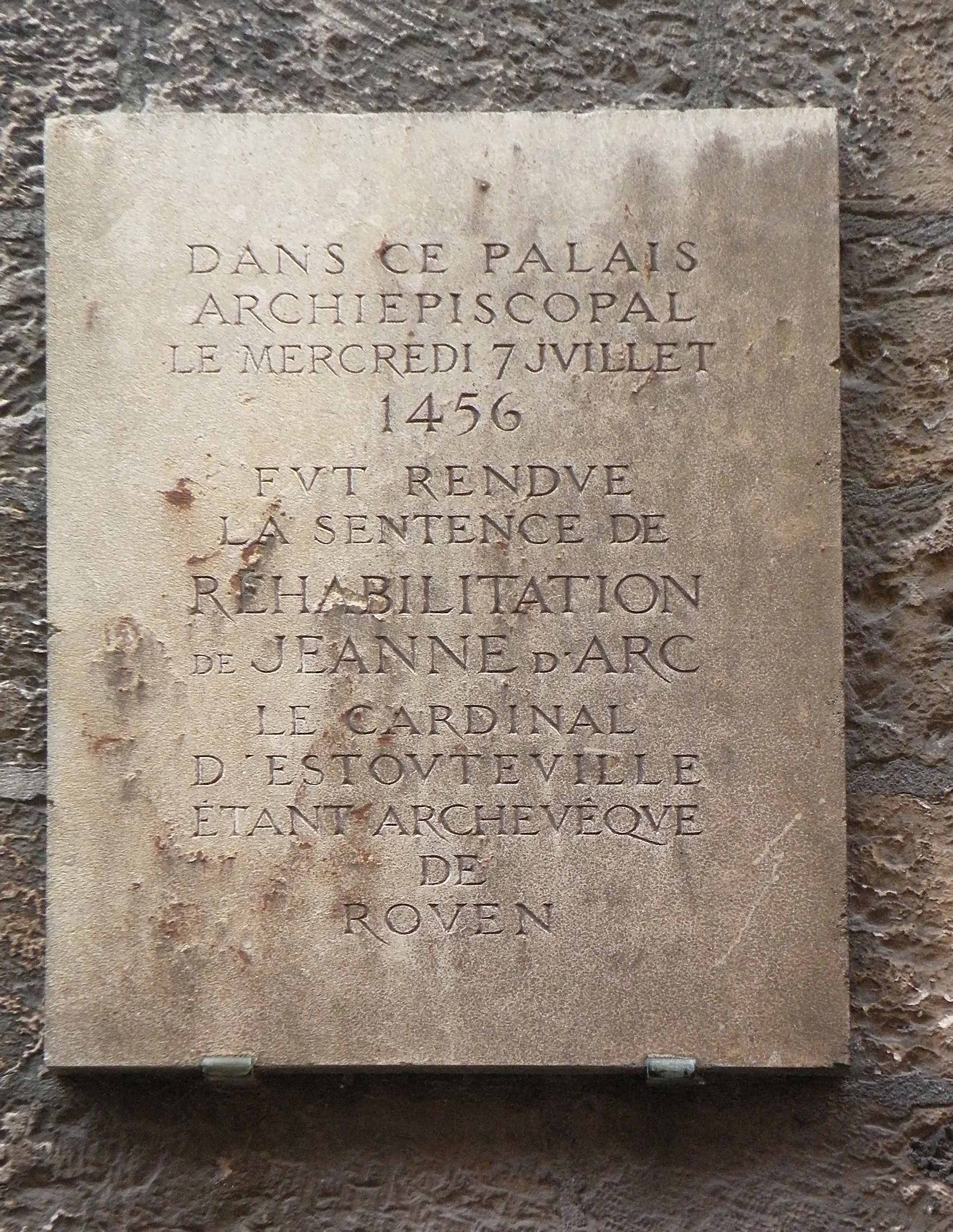 Jeanne_d_Arc_Rehabilitation_(Rouen).